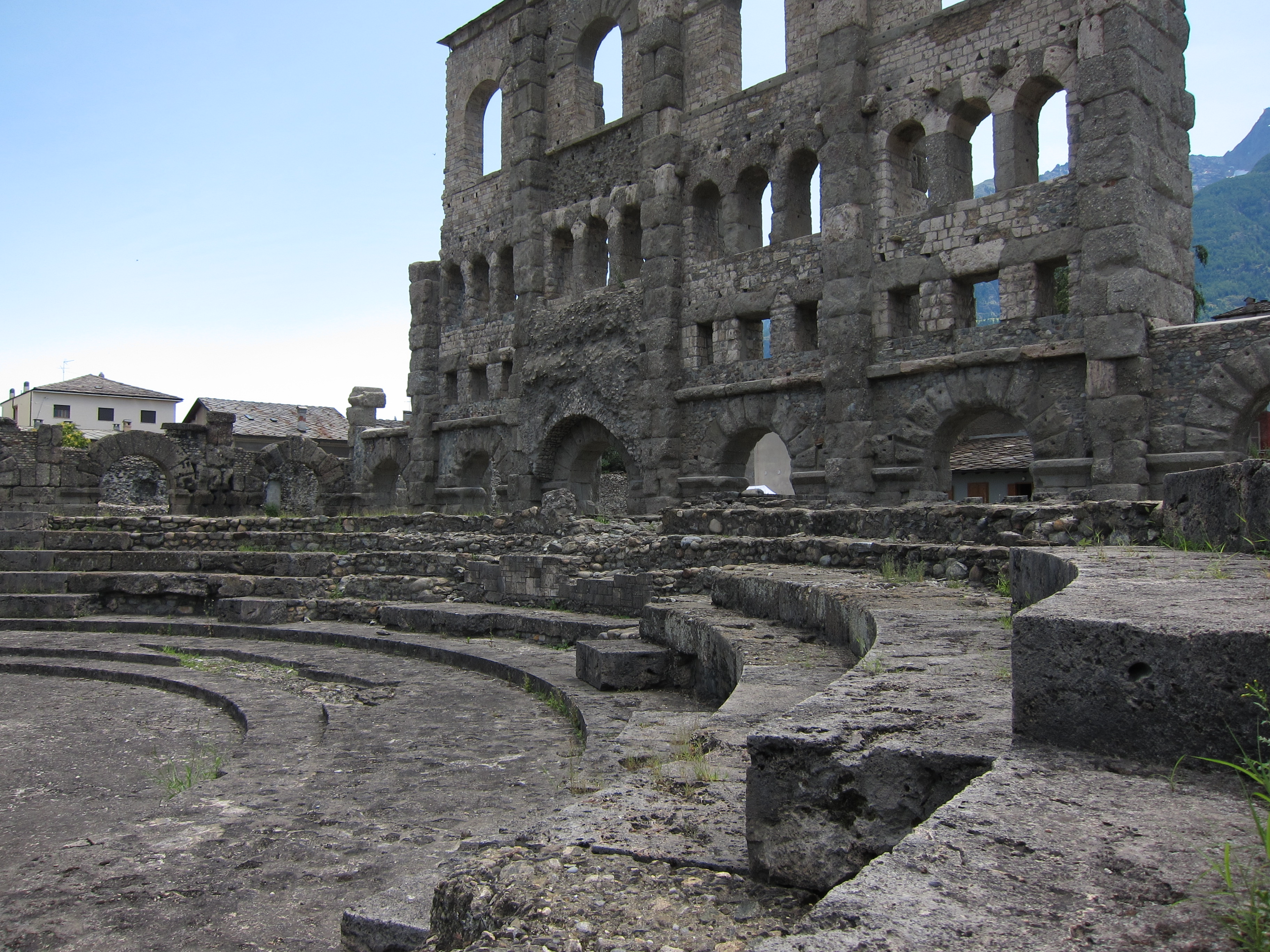 I monti sopra Aosta visti dal Teatro. Sullo sfondo si nota la caratteristica Torre campanile della Cattedrale di Sant'Orso This is a photo of a monument which is part of cultural heritage of Italy.